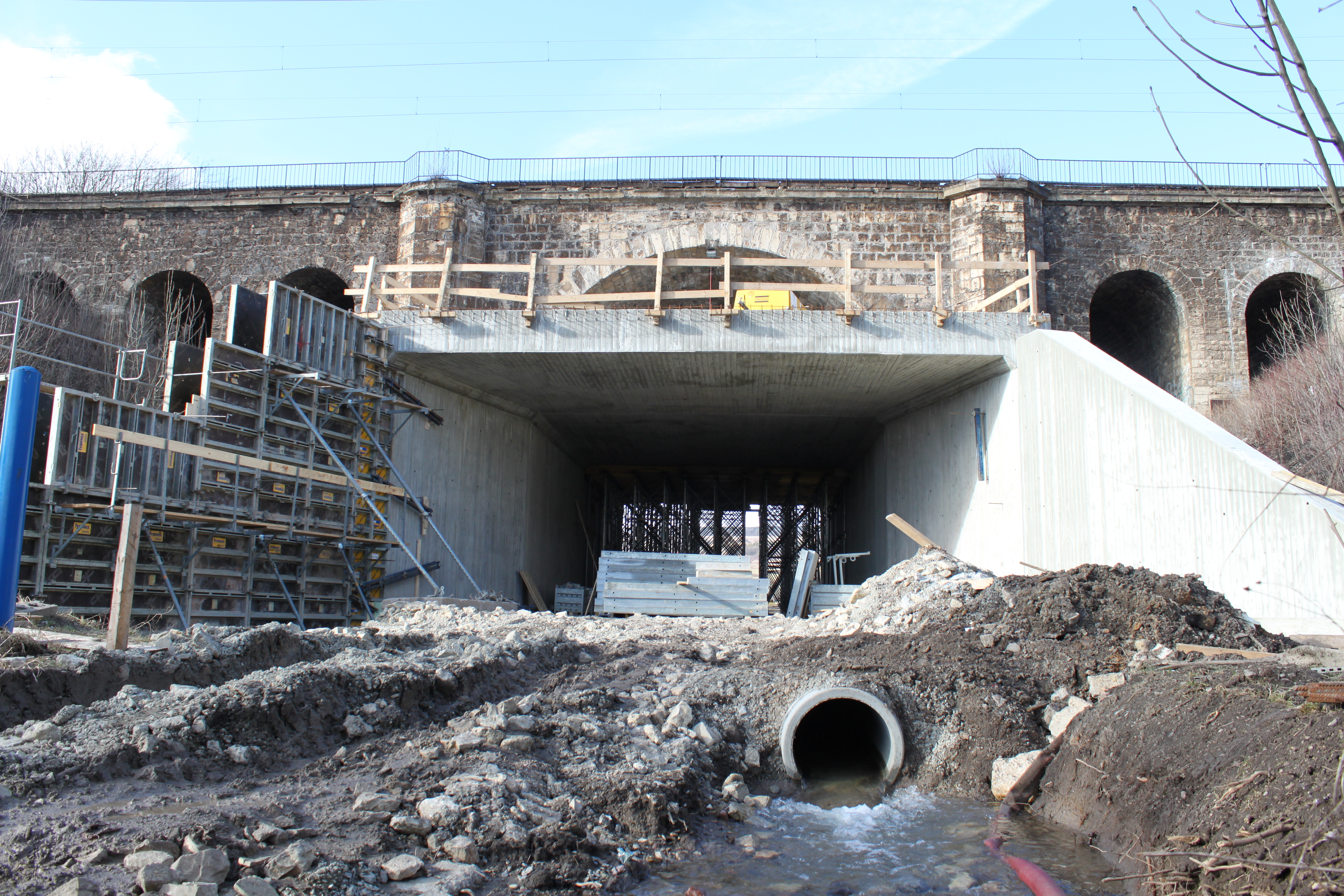 Erneuerung des Bahnviadukts in Gaberndorf bei Weimar. Tunnel unter einer Brücke, die offenbar verstärkt werden soll. Ein Fußgängertunnel unterquert die Strecke 150 m weiter, neben der Unterführung für die B7.